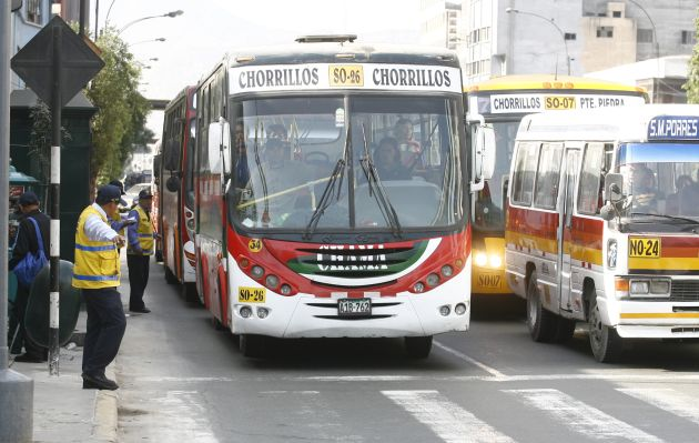 Transporte publico en Lima